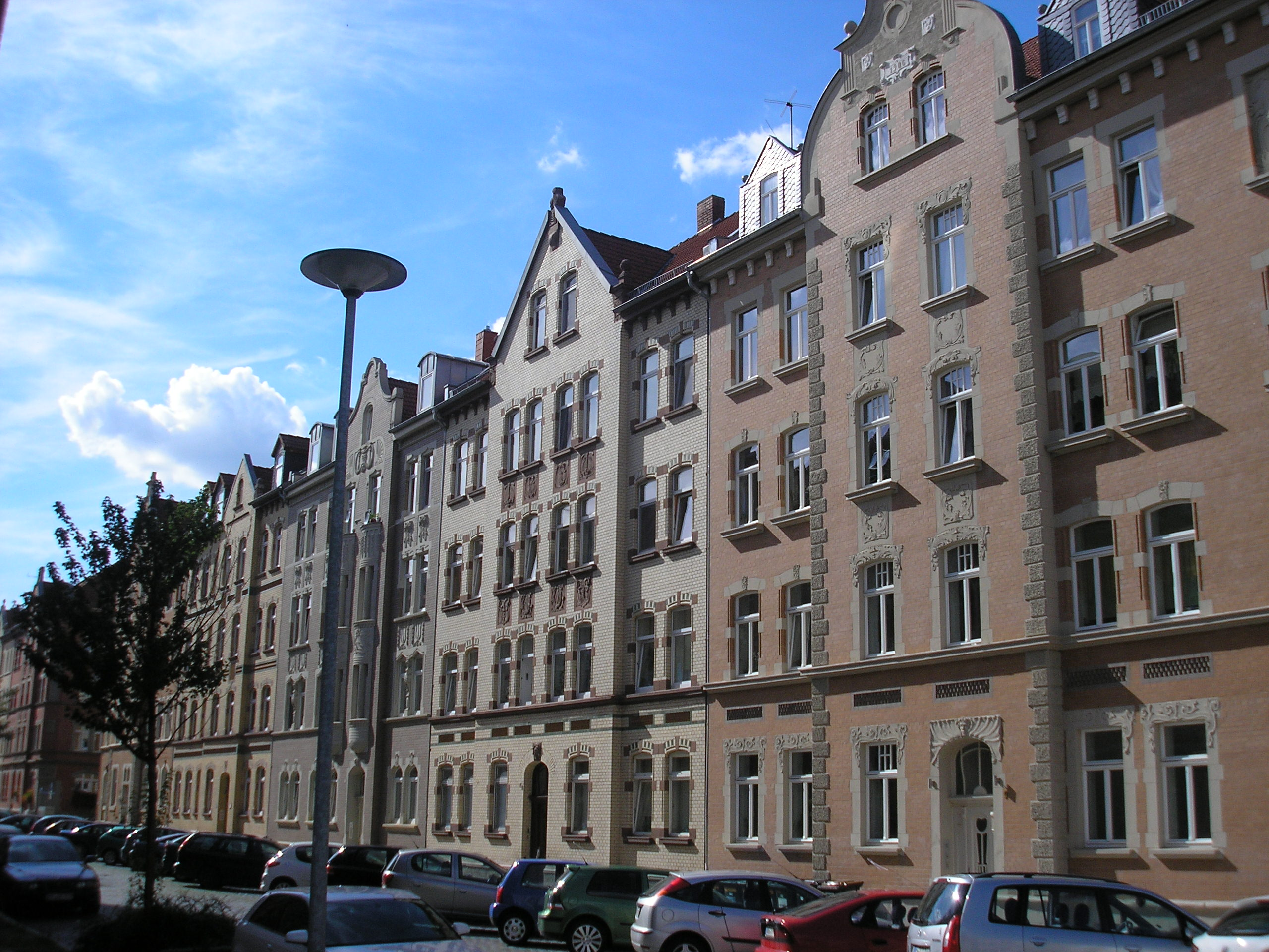 Die Ernst-Toller-Straße in Erfurt.